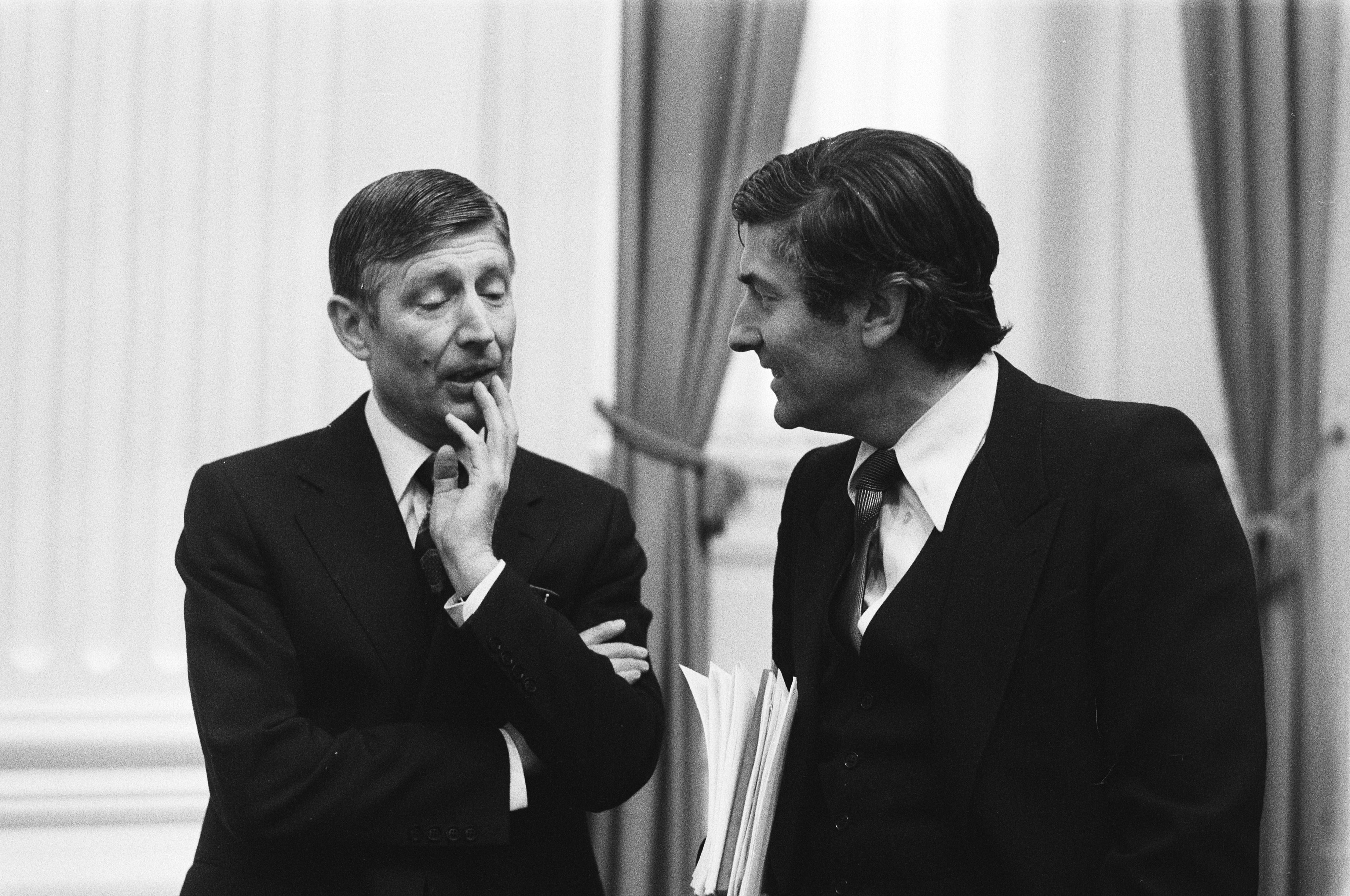 Collectie / Archief : Fotocollectie Anefo Reportage / Serie : Tweede Kamer - Bestek 1981 Beschrijving : Overleg tussen van Agt (links) en Lubbers Datum : 26 april 1979 Trefwoorden : kamerleden, parlementaire debatten, politiek, premiers Persoonsnaam : Agt, Dries van, Lubbers, Ruud Instellingsnaam : Tweede Kamer Fotograaf : Suyk, Koen / Anefo Auteursrechthebbende : Nationaal Archief Materiaalsoort : Negatief (zwart/wit) Nummer archiefinventaris : bekijk toegang 2.24.01.05 Bestanddeelnummer : 930-2343